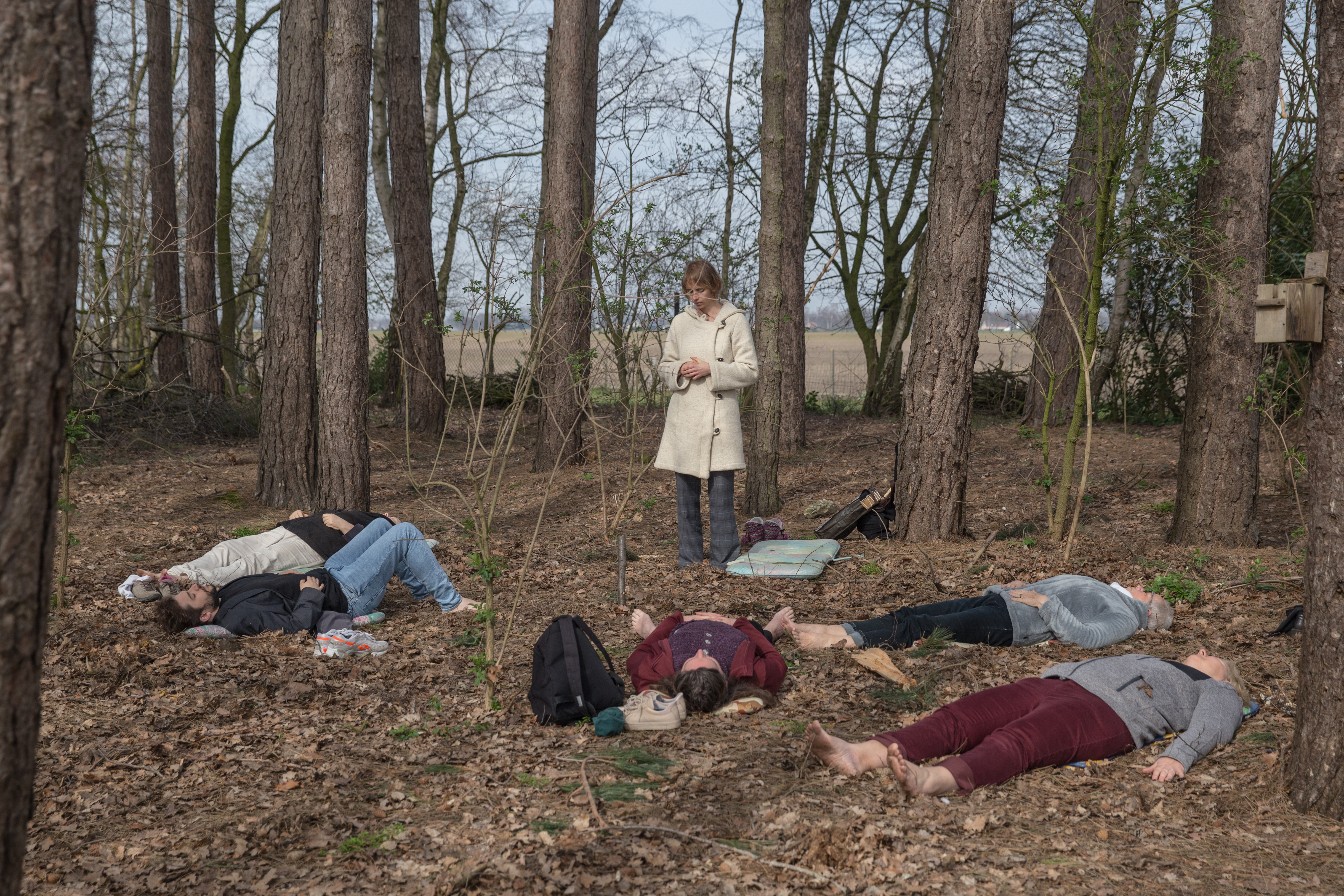 Shinrin-yoku-sessie in een bos in Kinrooi met boscoach Joke Custers